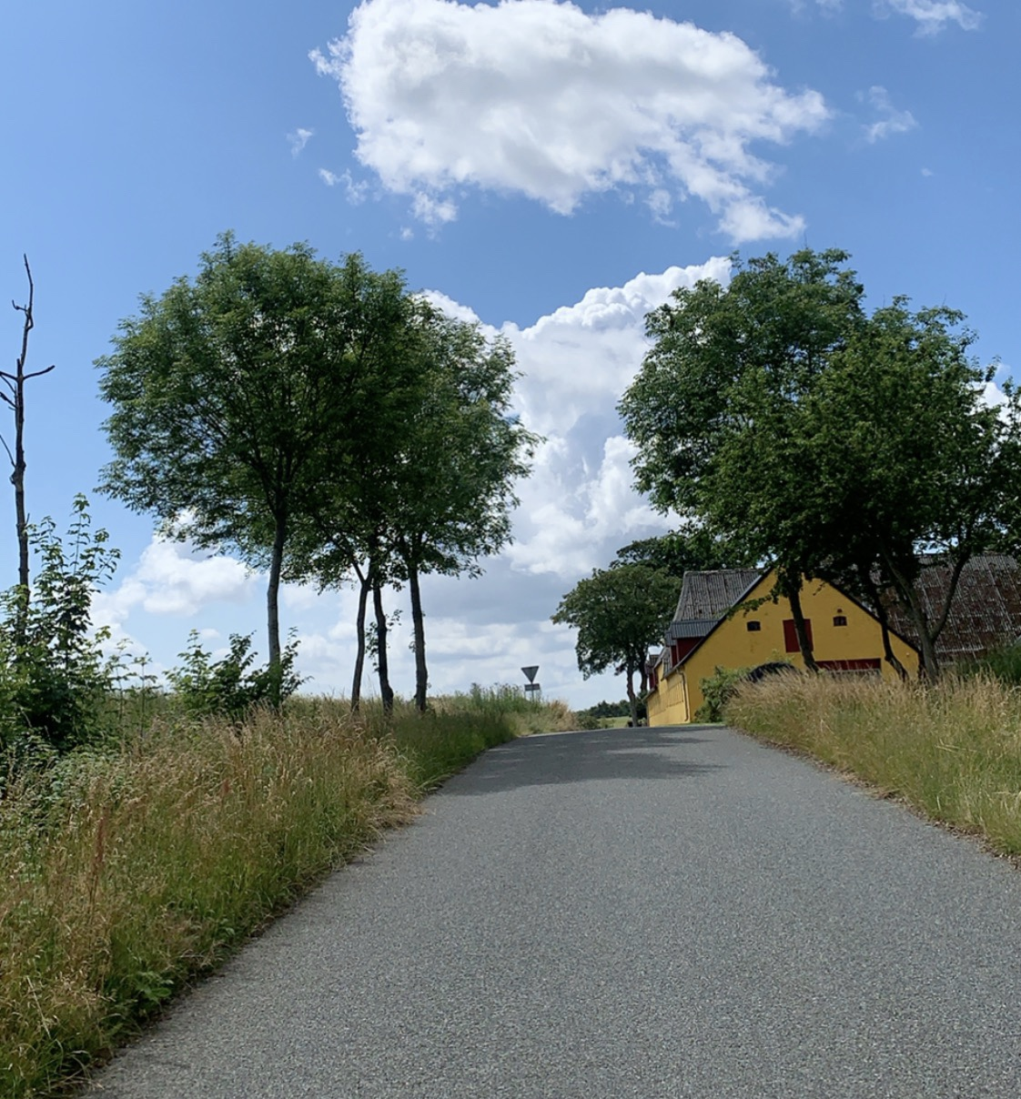 Haderupvej syd for Hadsund